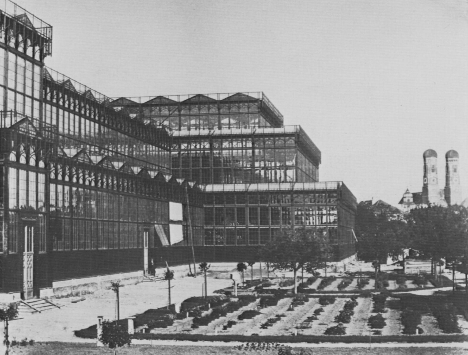 Hanfstaengl, Franz: Der Glaspalast kurz vor Vollendung des Rohbaus [2]